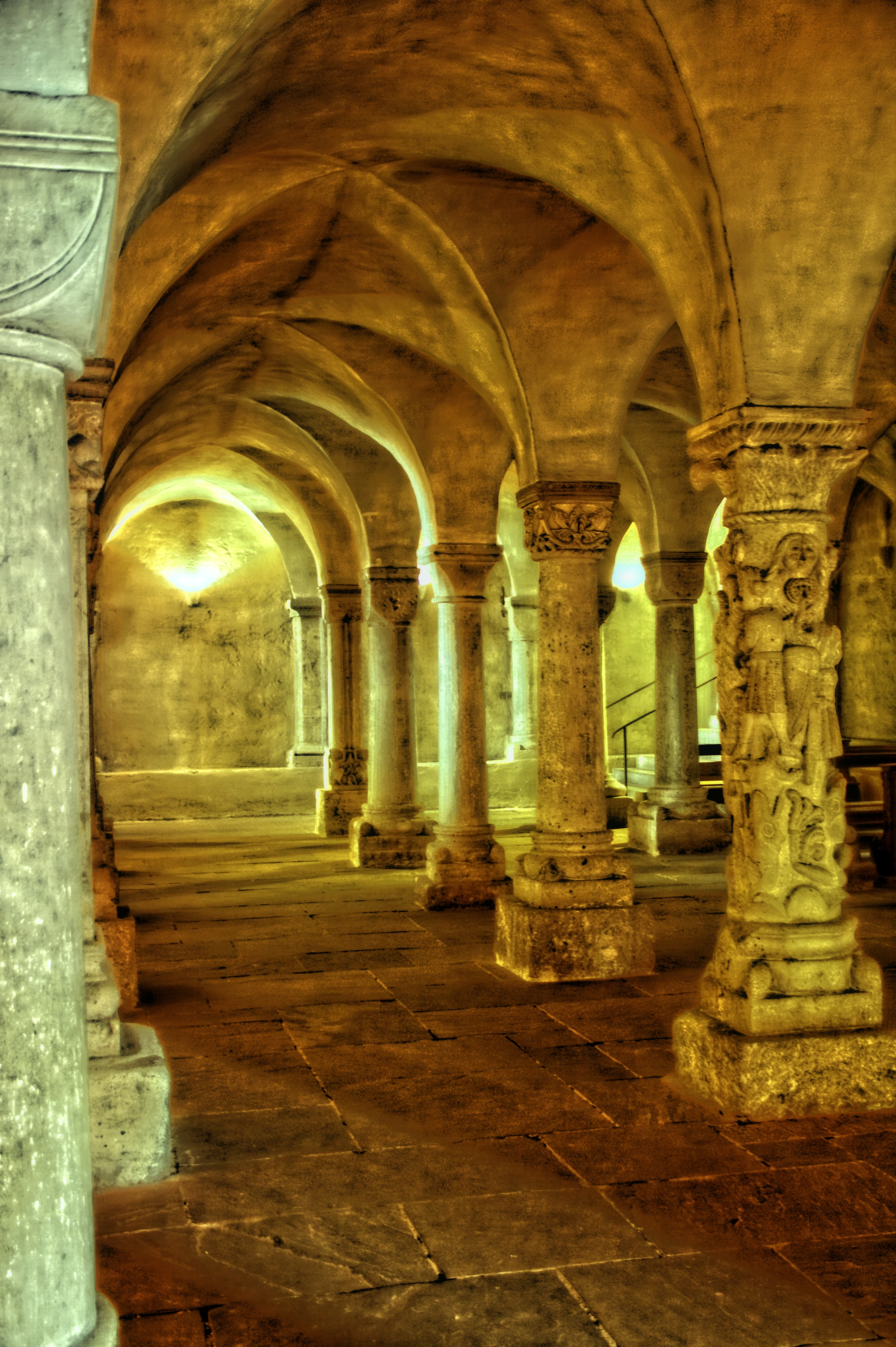 Freisinger Dom, KryptaThis is a photograph of an architectural monument.